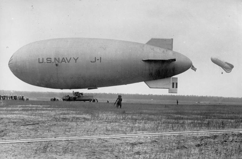 Das grösste amerikanische nichtstarre Luftschiff der Welt zerstört ! Das grösste nichtstarre Luftschiff der Welt der amerikanischen Marineluftfahrt ist nach einer Landung auf dem Luftschiffhafen Cape May (New Jersey) von einer Boe zerstört worden.